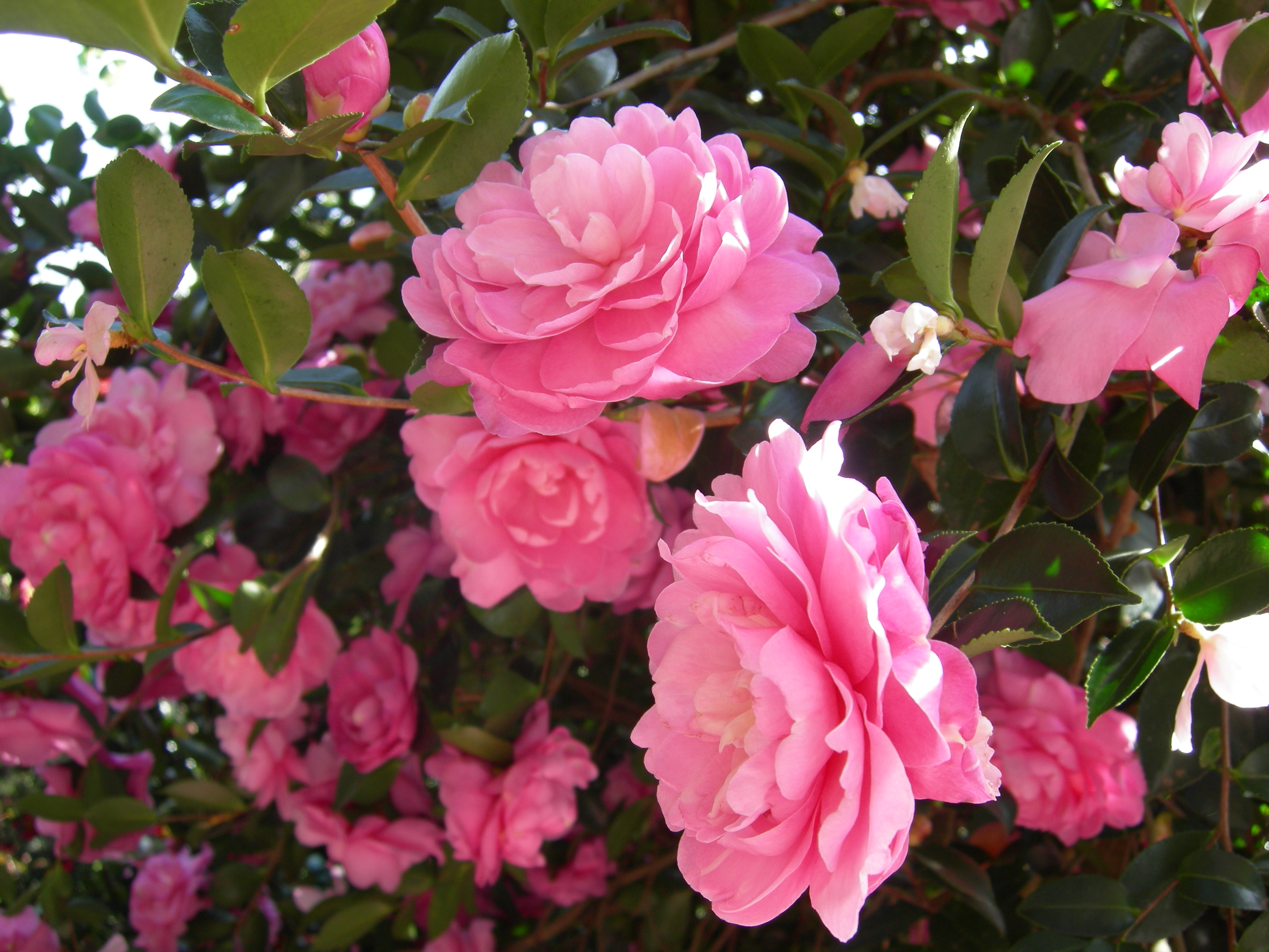 Rausva japoninė kamelija (geliurojus.lt medžiaga)